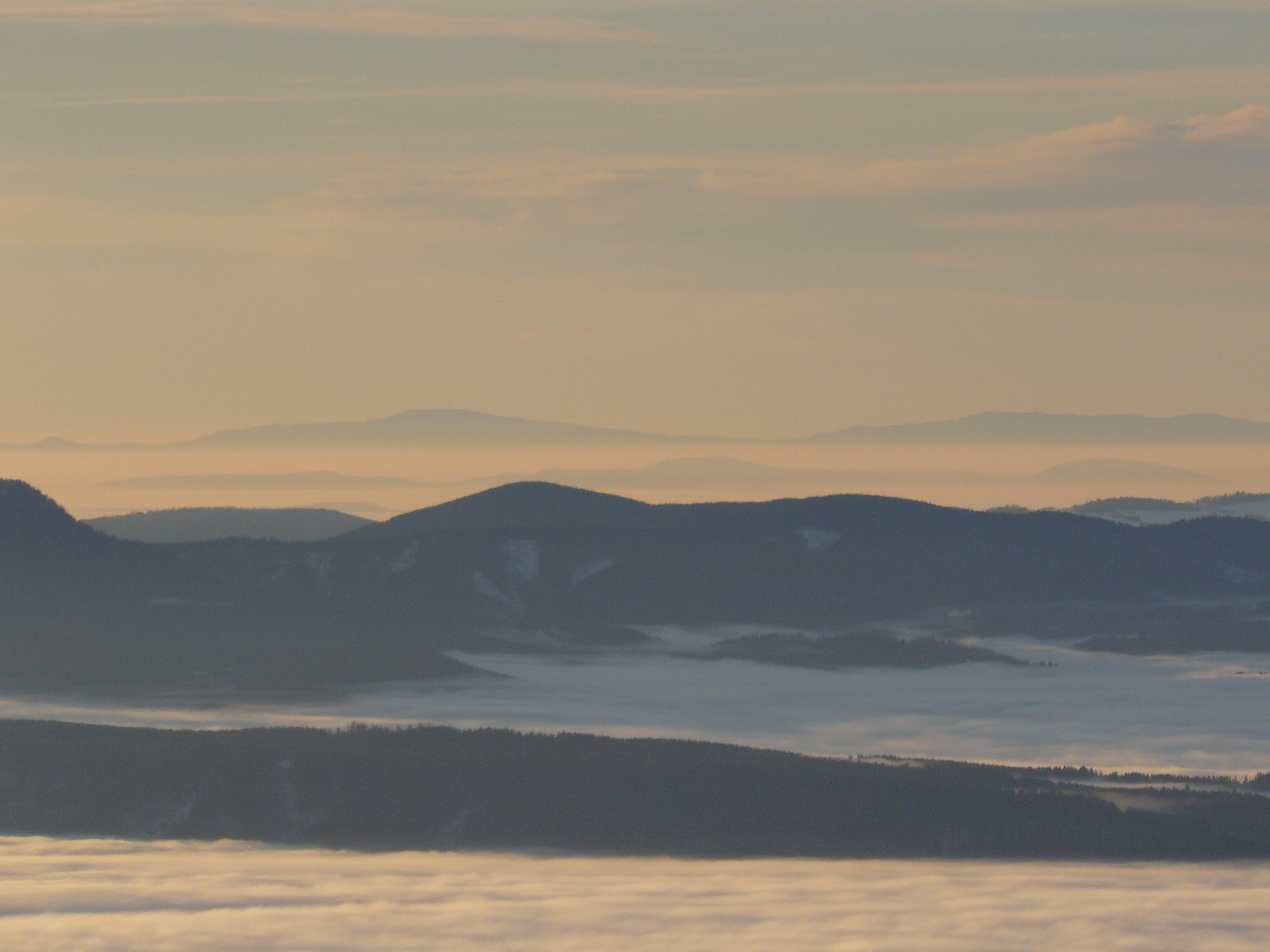 A Kékes az Alacsony-Tátrából (a leghátsó hegysor legmagasabb kiemelkedése), Chata MRŠ ĎUMBIER